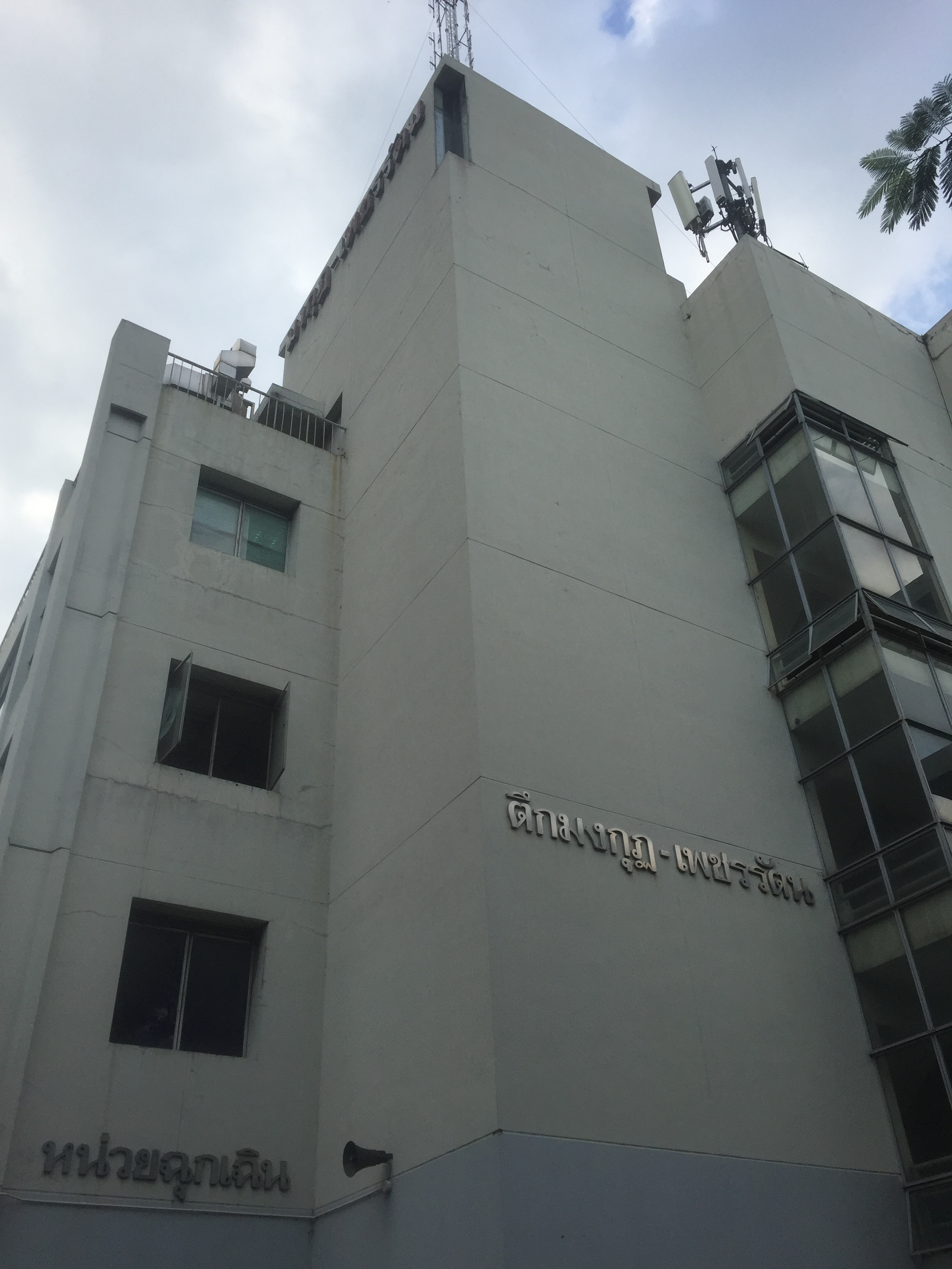 ตึกมงกุฏ-เพชรรัตน